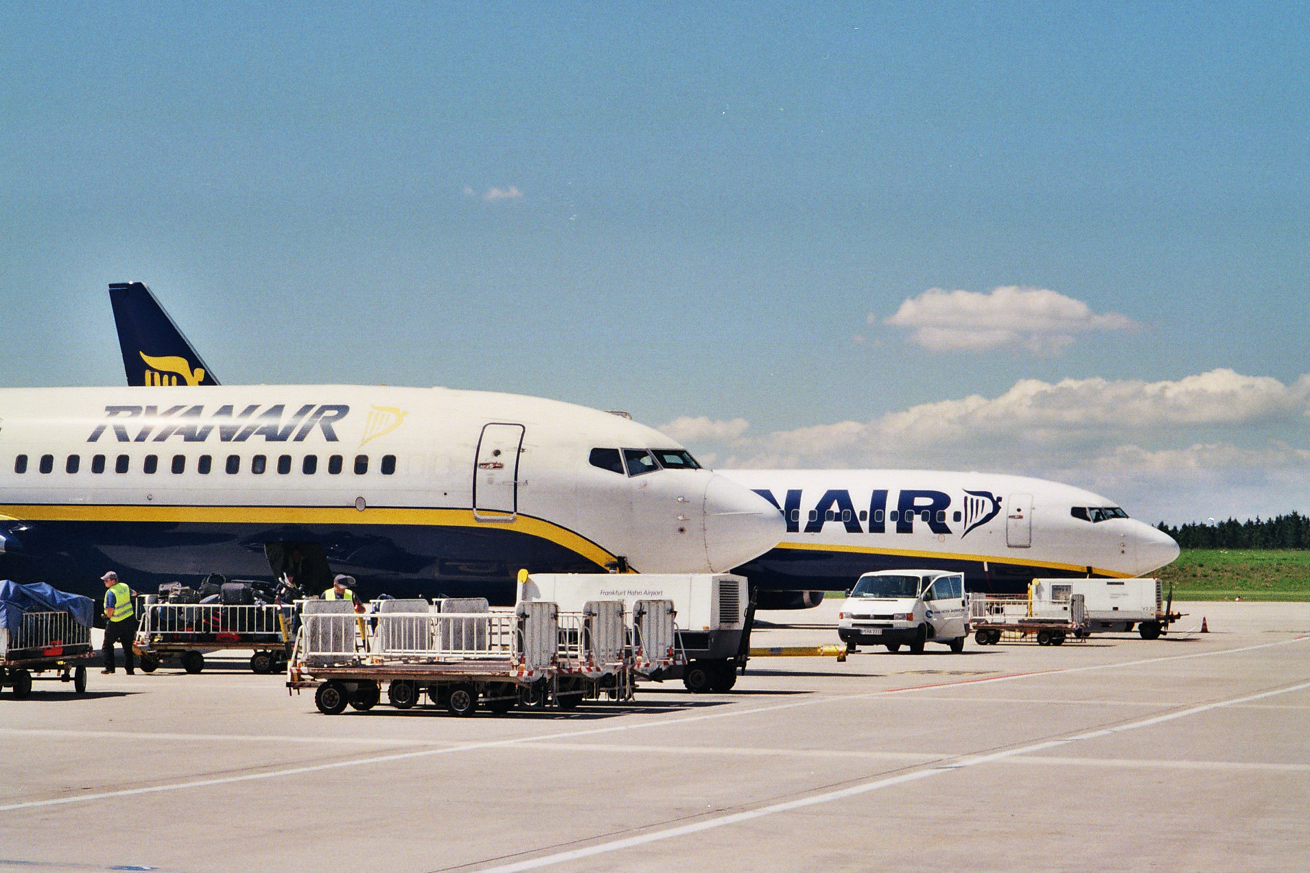 Ryanair-Maschinen auf dem Vorfeld von "Frankfurt-Hahn"